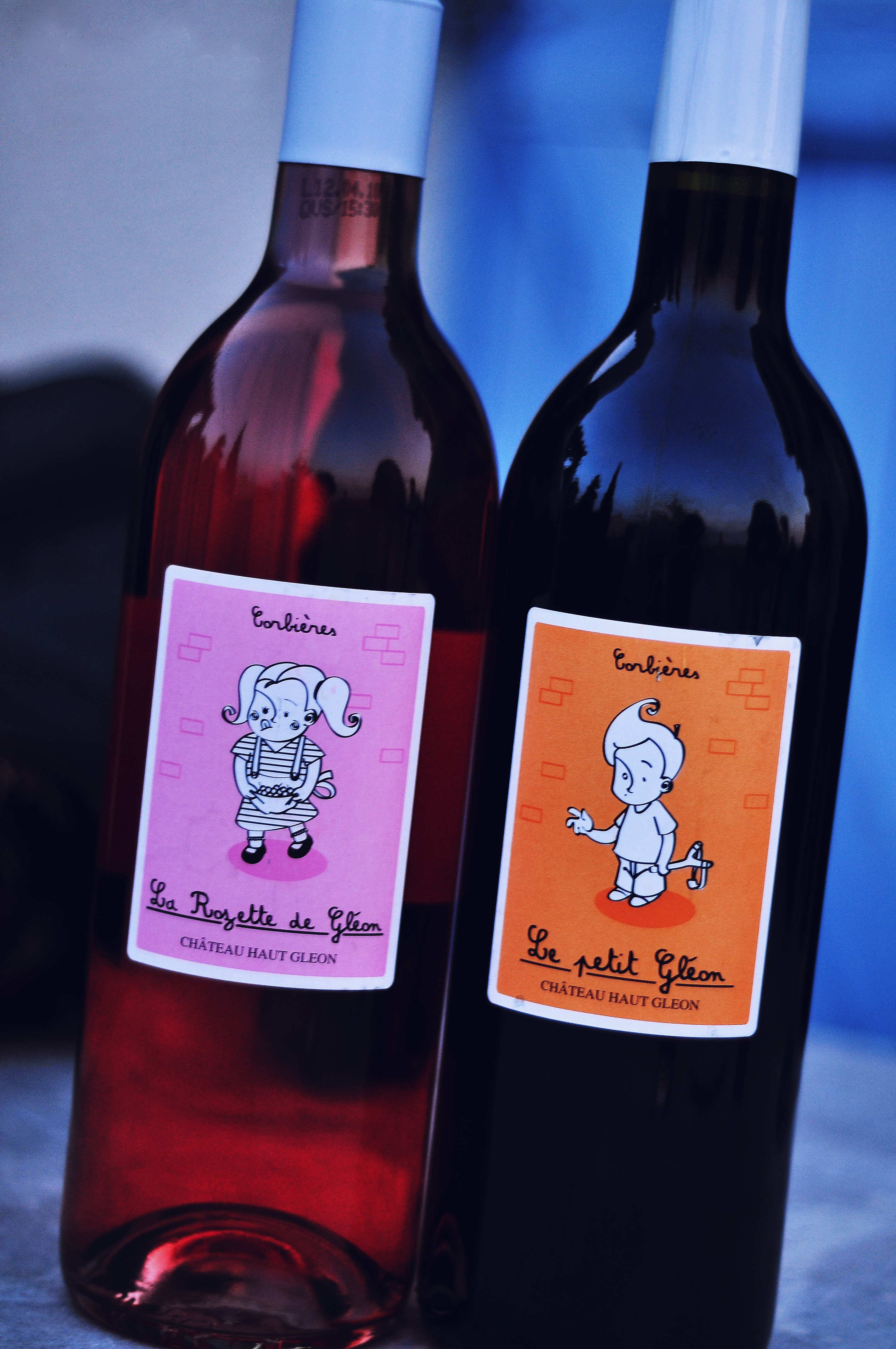 AOC Corbières Château Haut-Gléon à Durban-Corbières